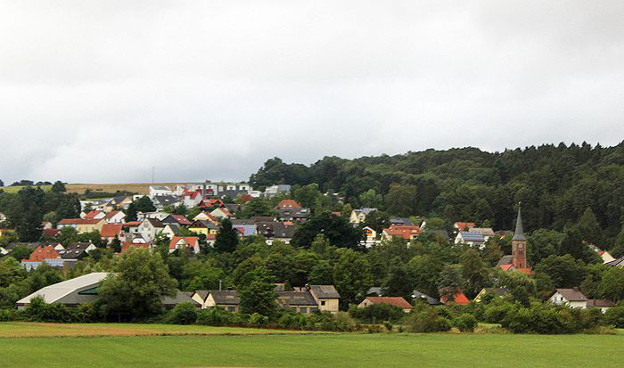 Ansicht von Einöd, Stadt Homburg, Saarpfalz-Kreis, Saarland